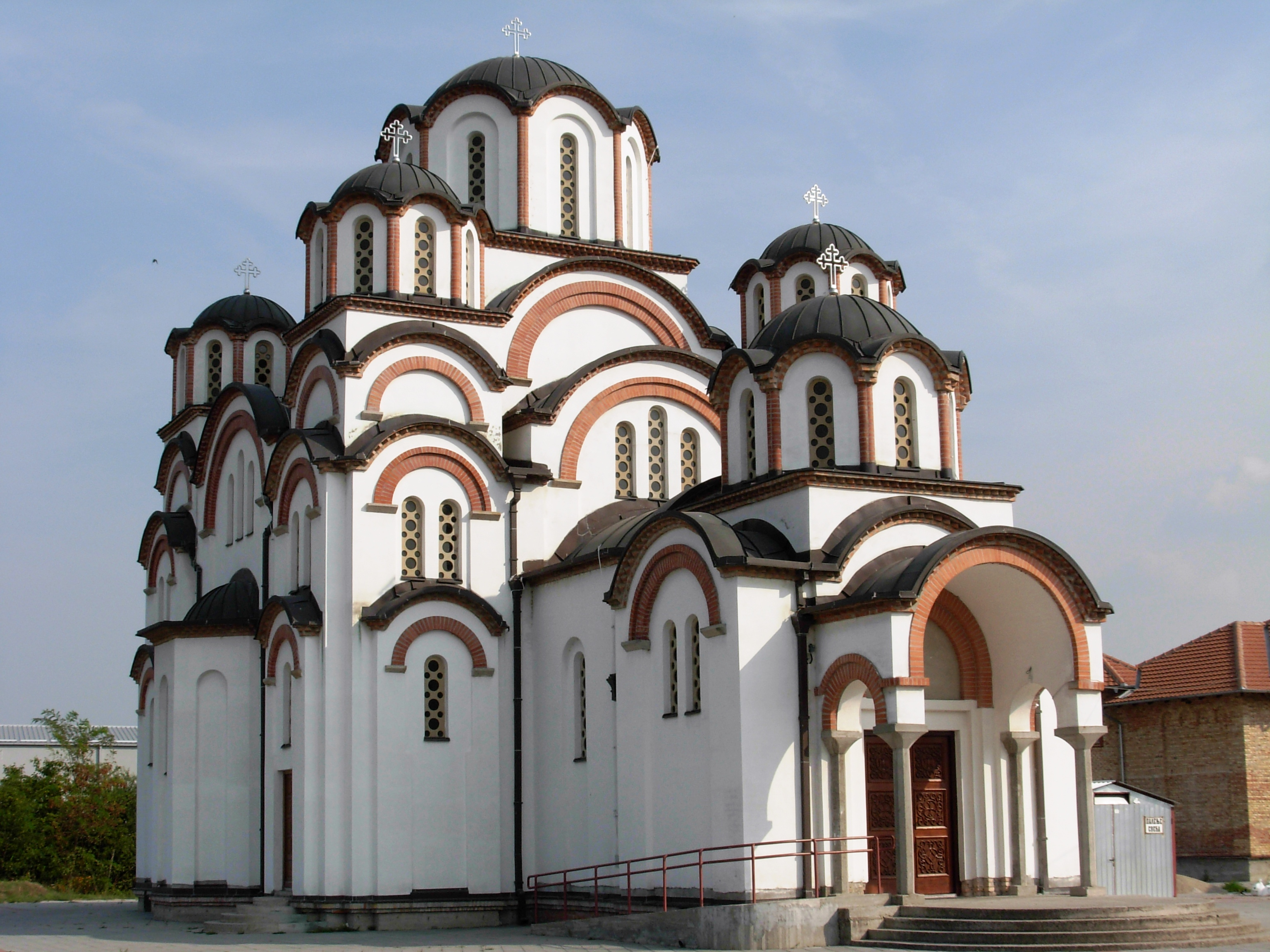 Orthodox church in Veternik, near Novi Sad